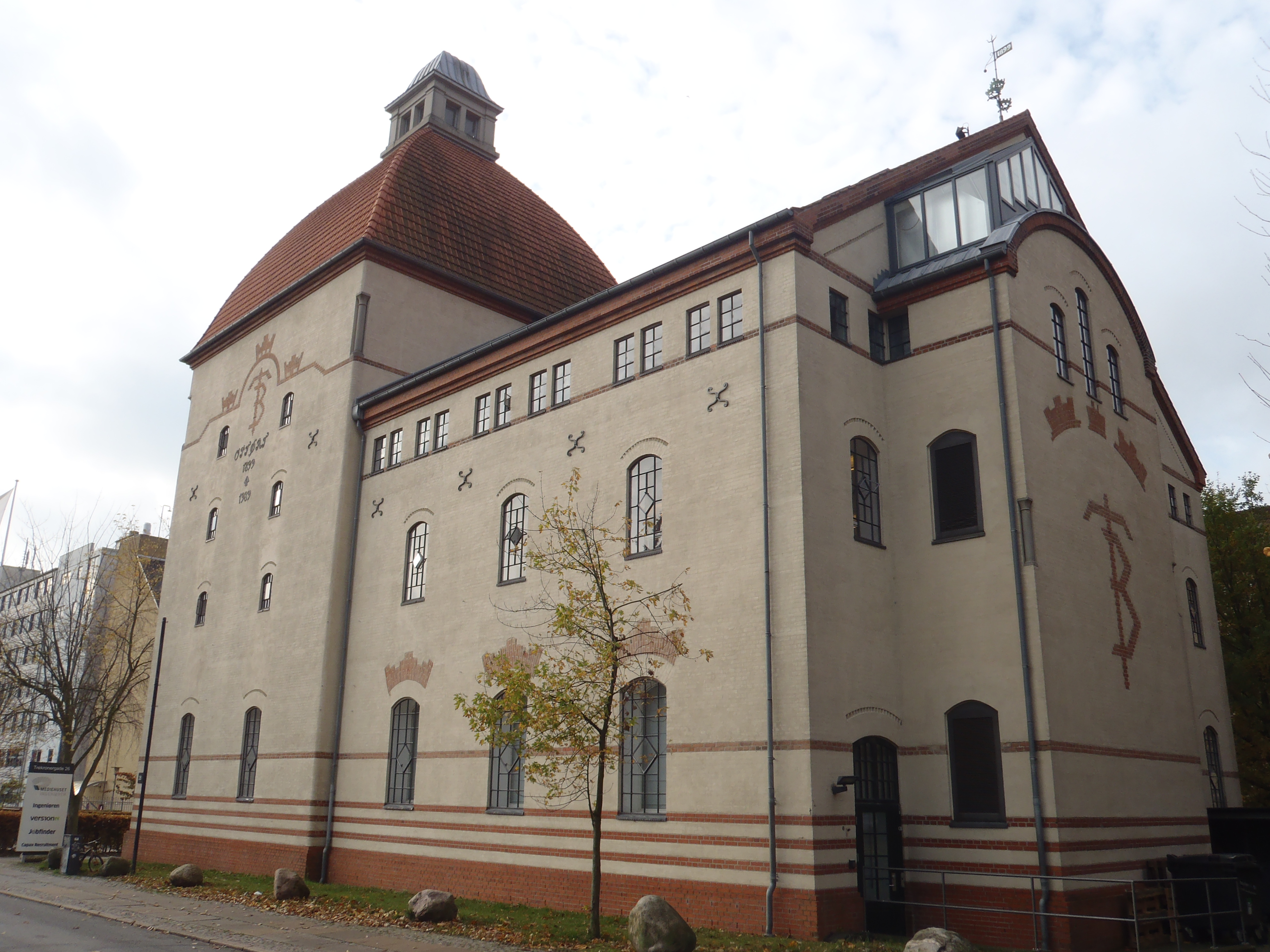 Mediehuset Ingeniørens domicil i Trekronergade 26 i Valby. "Trekroner Bryggeri er opført 1898 med C. Leuning-Borch som arkitekt. Bygningen fungerede kun som bryggeri i få år, hvorefter De Forenede Bryggerier opkøbte selskabet. I bygningen blev der efterfølgende indrettet maltgøreri og senere garveri." (s. 52/54 i 'Bydelsatlas Valby', 1994, Miljøministeriet og Københavns Kommune